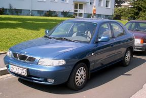 Daewoo Nubira I BJ 1998.